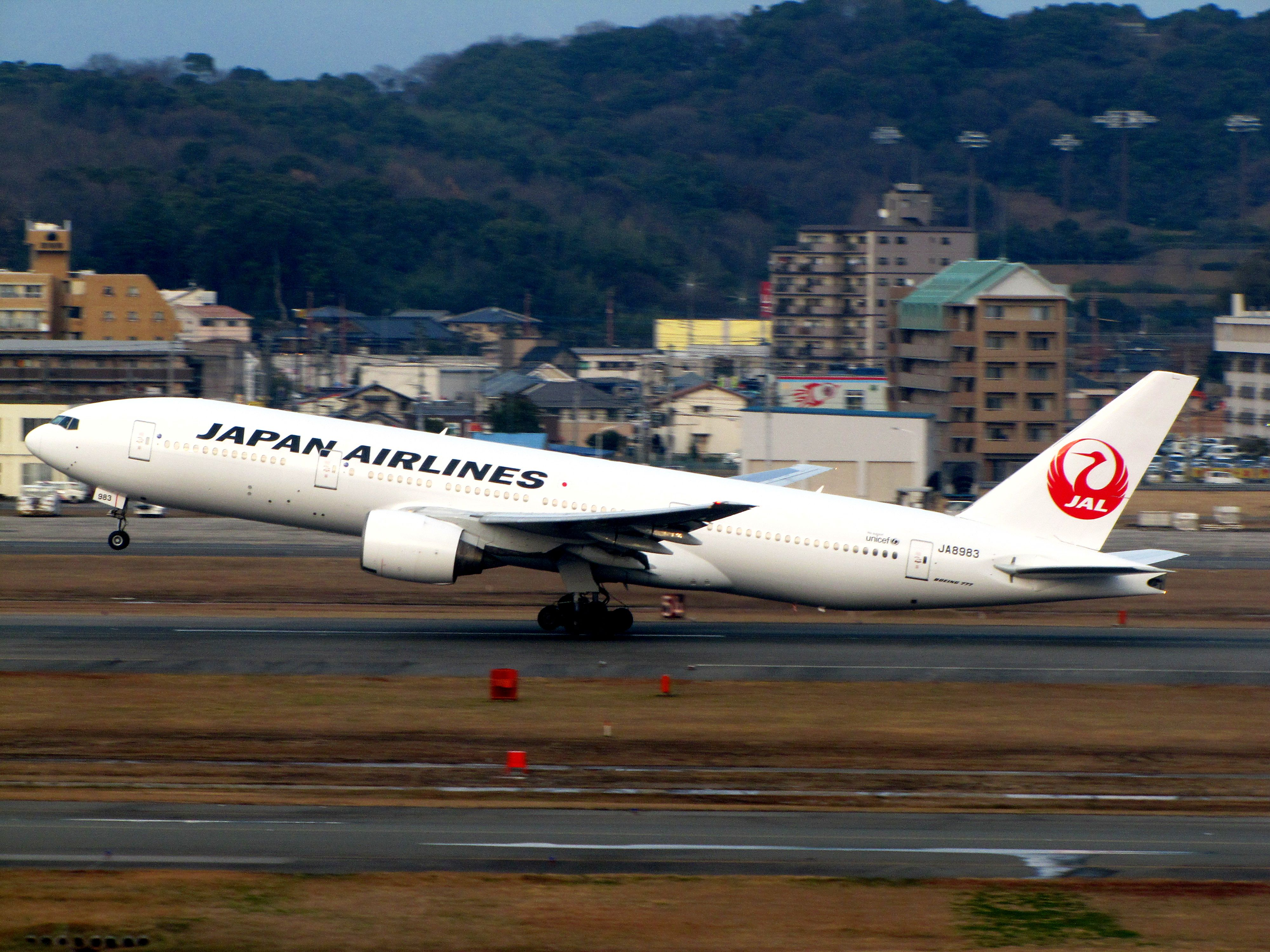 Japan Airlines Boeing 777-200 Fukuoka Airport